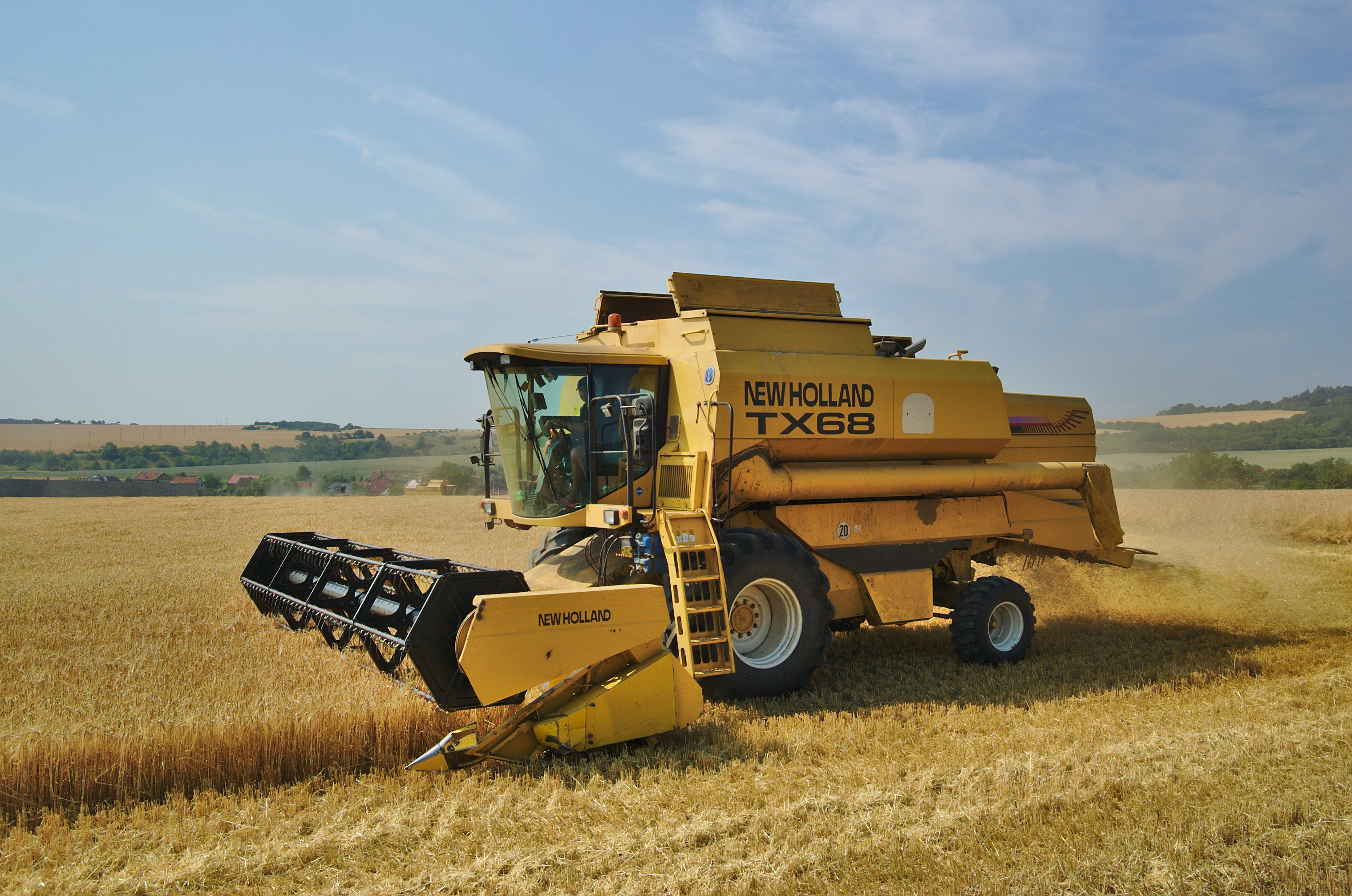 Kombajn New Holland TX68 seče pole mezi Slatinkami a Lípami, okres Prostějov